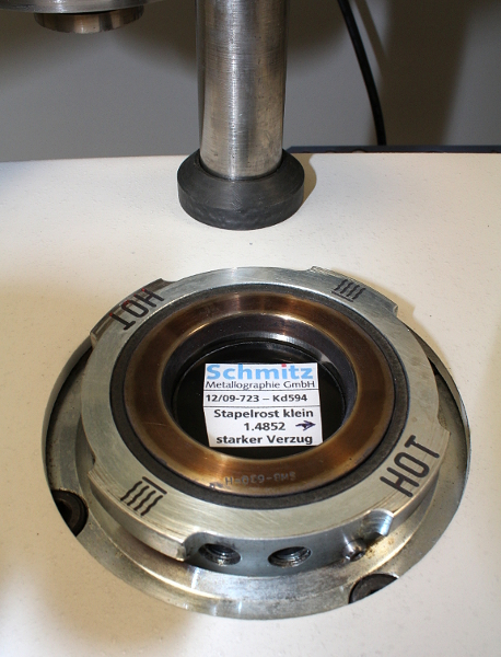 Auf das dunkle Kunststoffgranulat haben wir unser Etikett gelegt um es mit etwas klarem WEM mit einzubetten.